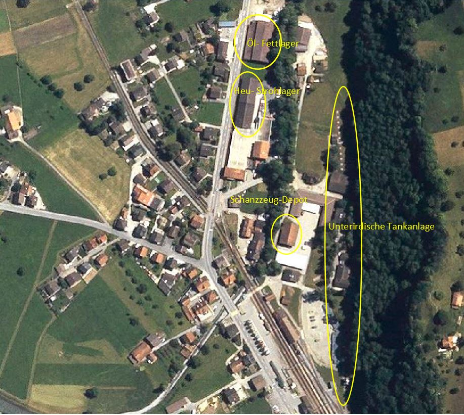 Diechtersmatt, Giswil OW, Schweiz: 1988